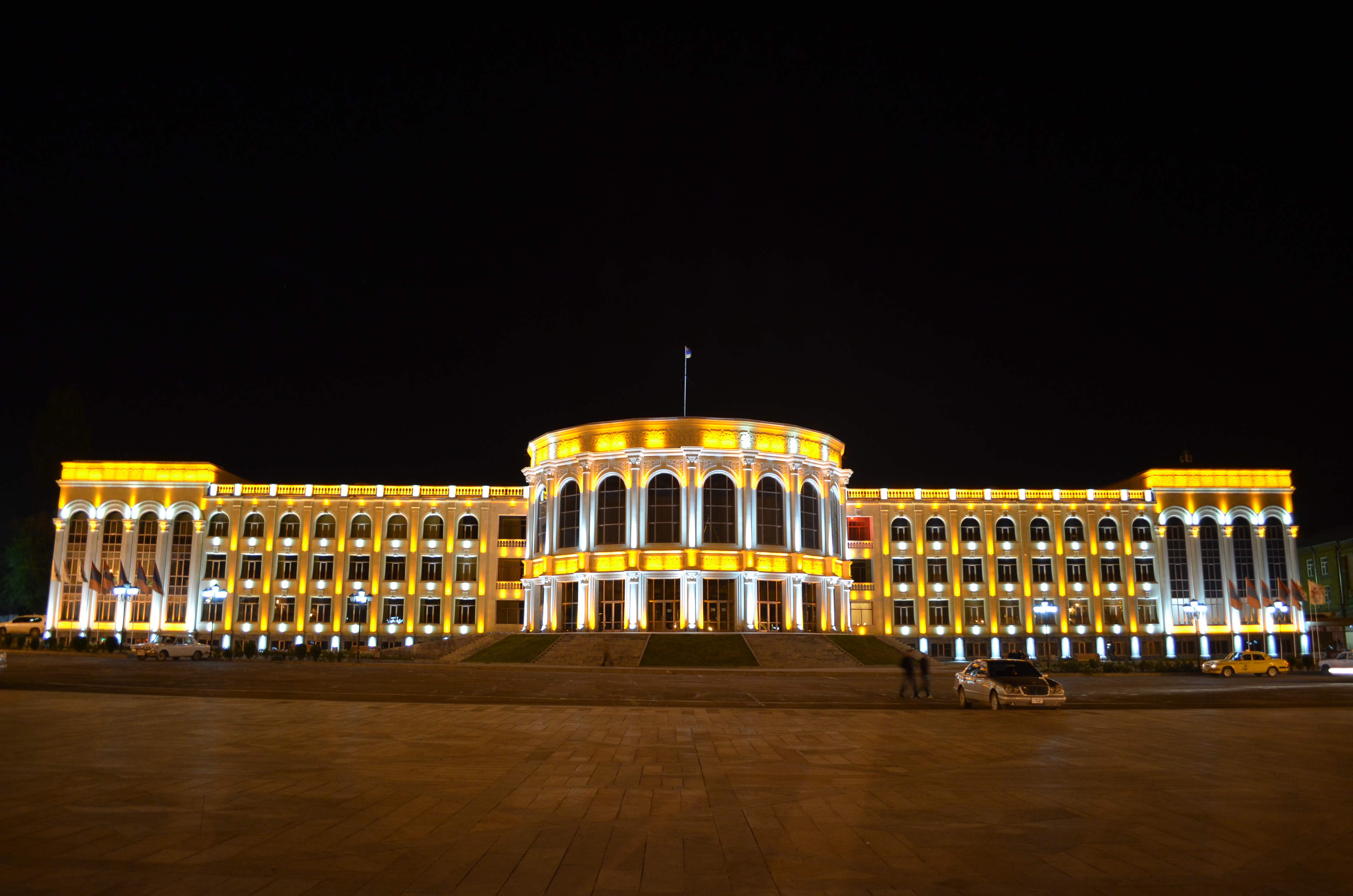 Building of Gyumri Mayor's Offic.